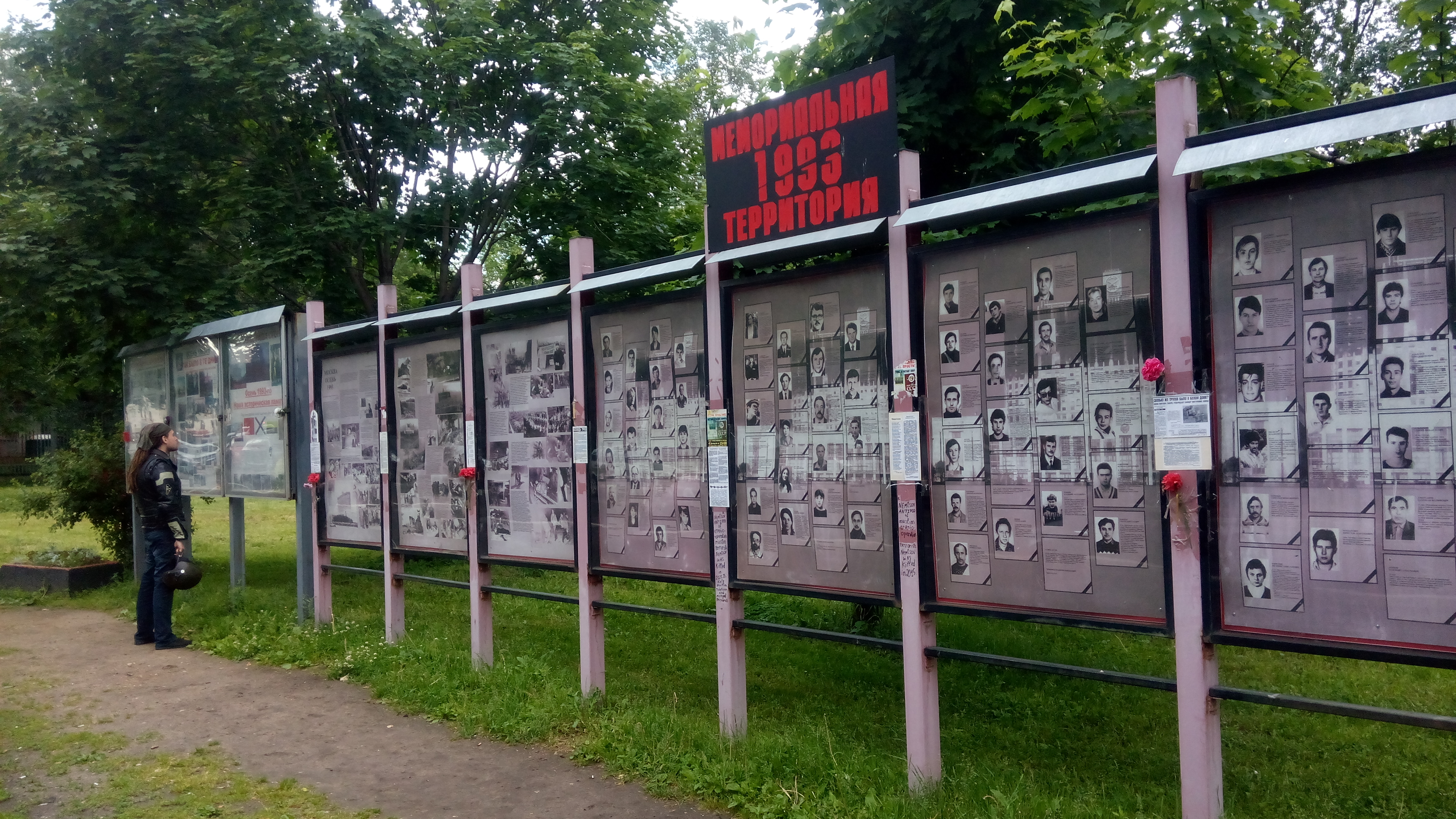 Памятная доска посвященная событиям 1993 года. Находится за домом Правительства РФ, напротив жилого дома ул. Дружинниковская, 11а.